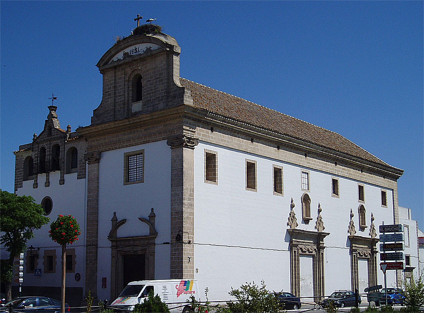 Convento del Espíritu Santo, ejemplo de arquitectura neoclásica en El Puerto de Santa María, España.